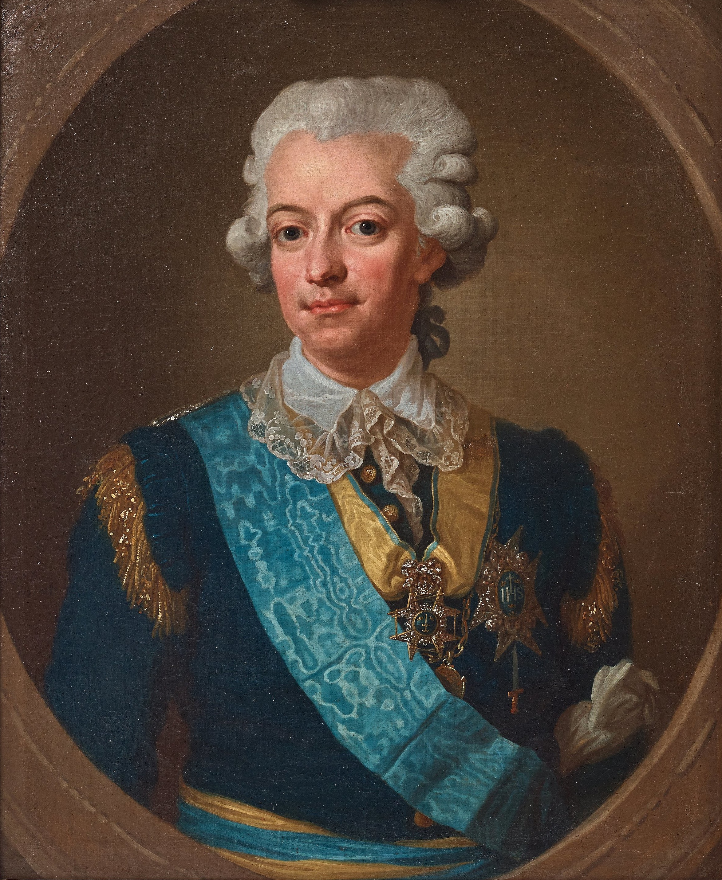 Porträtt av konung Gustaf III (1746-1792) iklädd flottans uniform m/1779. Kungen bär på bilden Serafimerordens band, samt dess kraschan. Kungen bär även kraschan för en Riddare med stora korset av Svärdsorden. Runt halsen syns kommendörskorset av Svärdsorden, samt under denna stora Svensksundsmedaljen i guldlänkar. Målning från ca 1791 av Lorens Pasch den yngre.